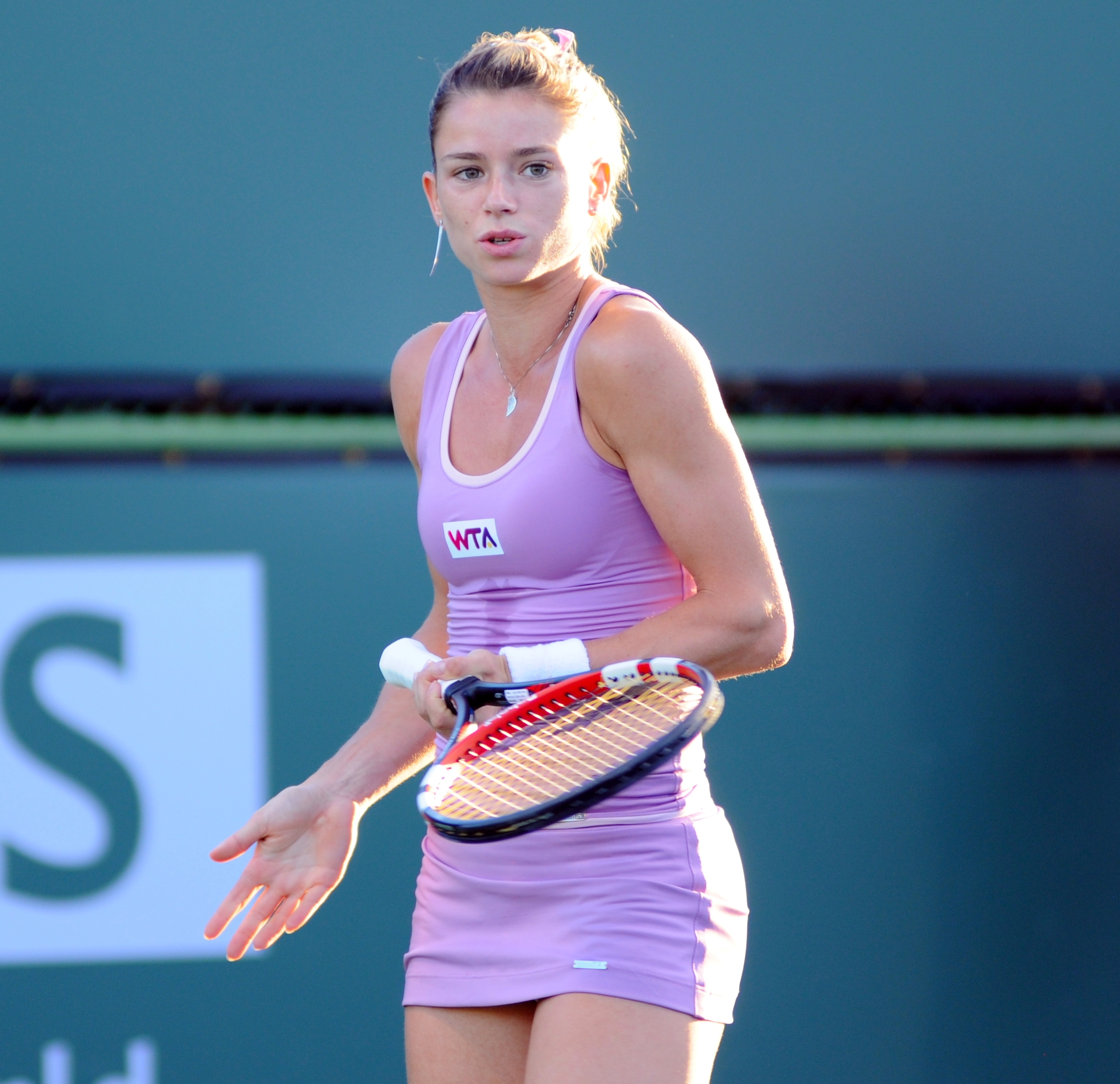 2014 BNP Paribas Open